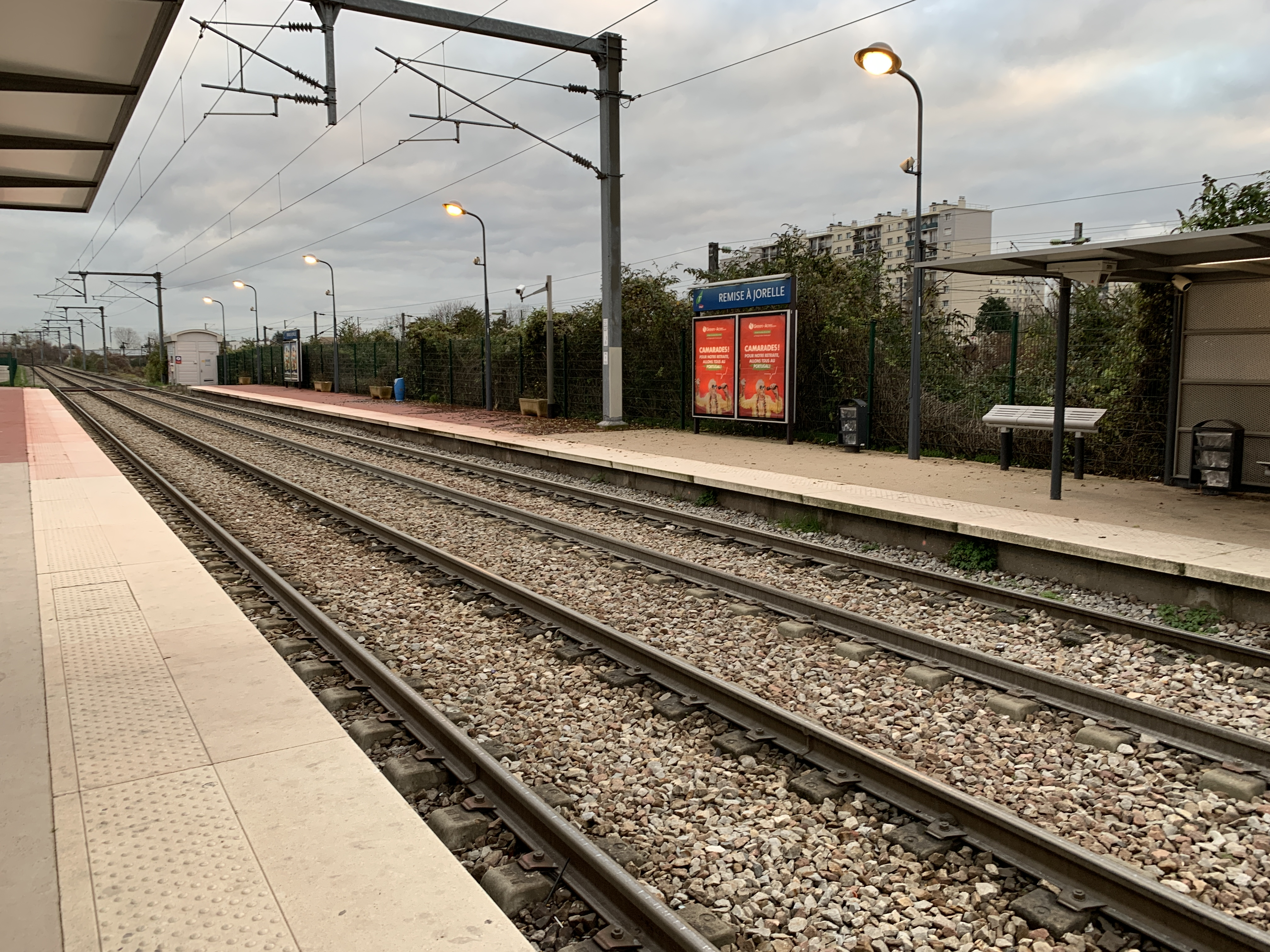 Station de tramway Remise à Jorelle de la ligne 4 du tramway d'Île-de-France, Bondy.